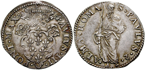 Italia, Stato pontificio. Paolo III. 1534-1549. AR Paolo (3.22 g). zecca di Roma. •PAVLVS•III• •PONT•MAX•, Stemma Farnese dentro cornice rococo sormontata da tiara e chiavi decussate. S•PAVLVS•(segno di zecca)• •ALMA•ROMA, San Paolo nimbato stante di fronte, che tiene una spada puntata in alto. Italy, Papal States. Paulus III. 1534-1549. AR Paolo (3.22 g). Rome mint. •PAVLVS•III• •PONT•MAX•, Farnese coat-of-arms within rococo frame surmounted by papal tiara and crossed keys S•PAVLVS•(mintmark)• •ALMA•ROMA, Nimbate Saint Paul standing facing, holding sword and pointing to it. CNI XV pg. 414, 106; Muntoni 56; Berman 910.